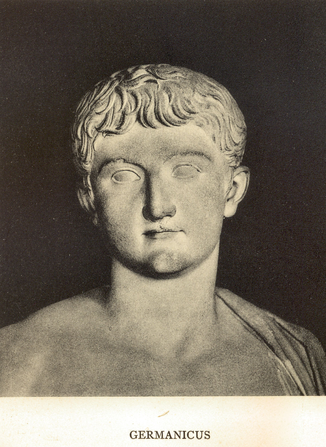 Remastered from Alfred von Domaszewski Geschichte der Romischen Kaiser Verlag von Quelle & Meyer in Leipzig 1914.